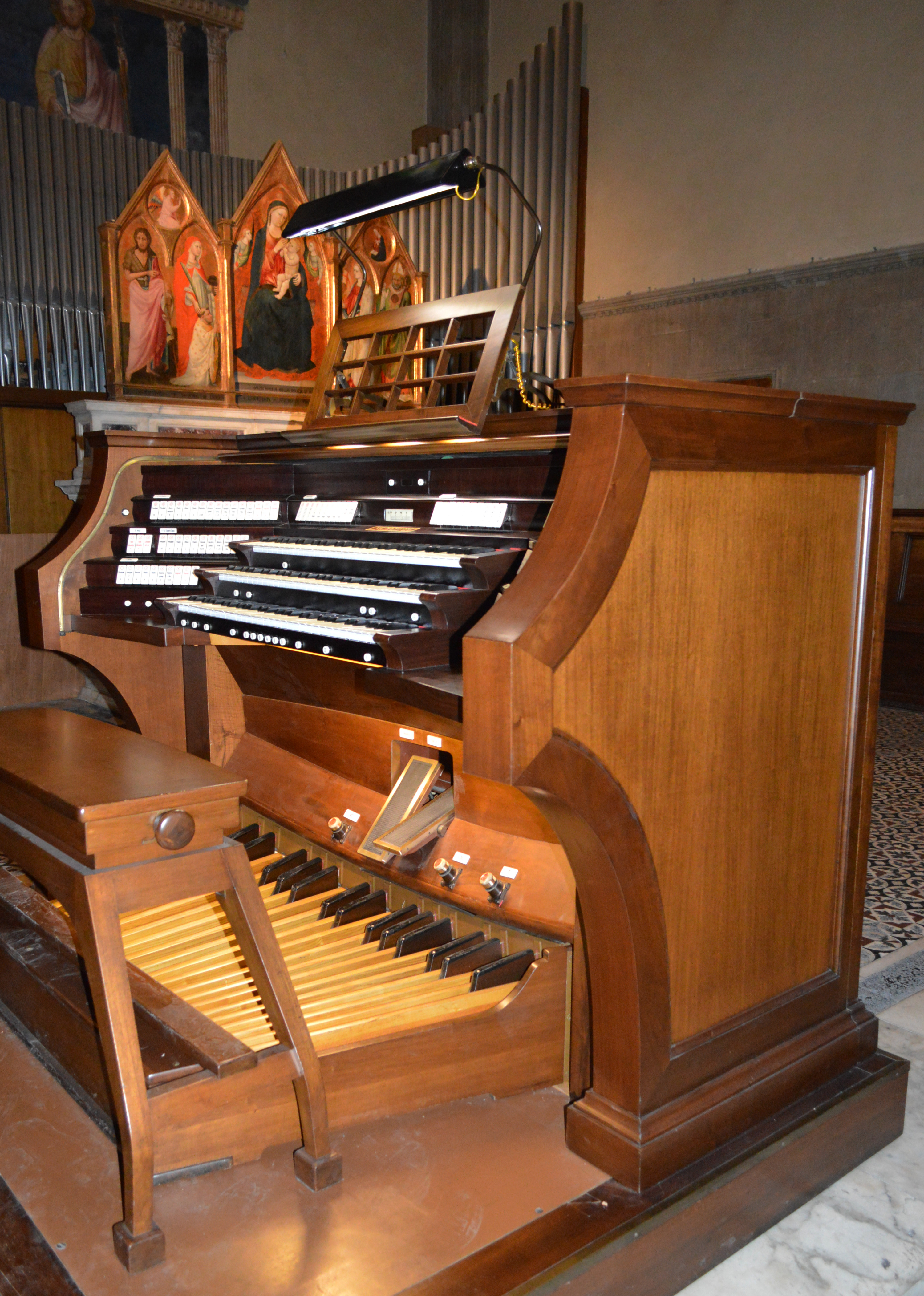 La consolle a tre manuali, situata nella cappella di San Jacopo.